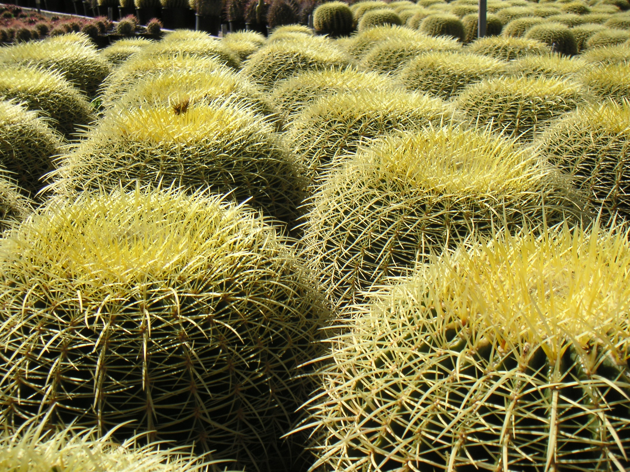 Alien incubation devices